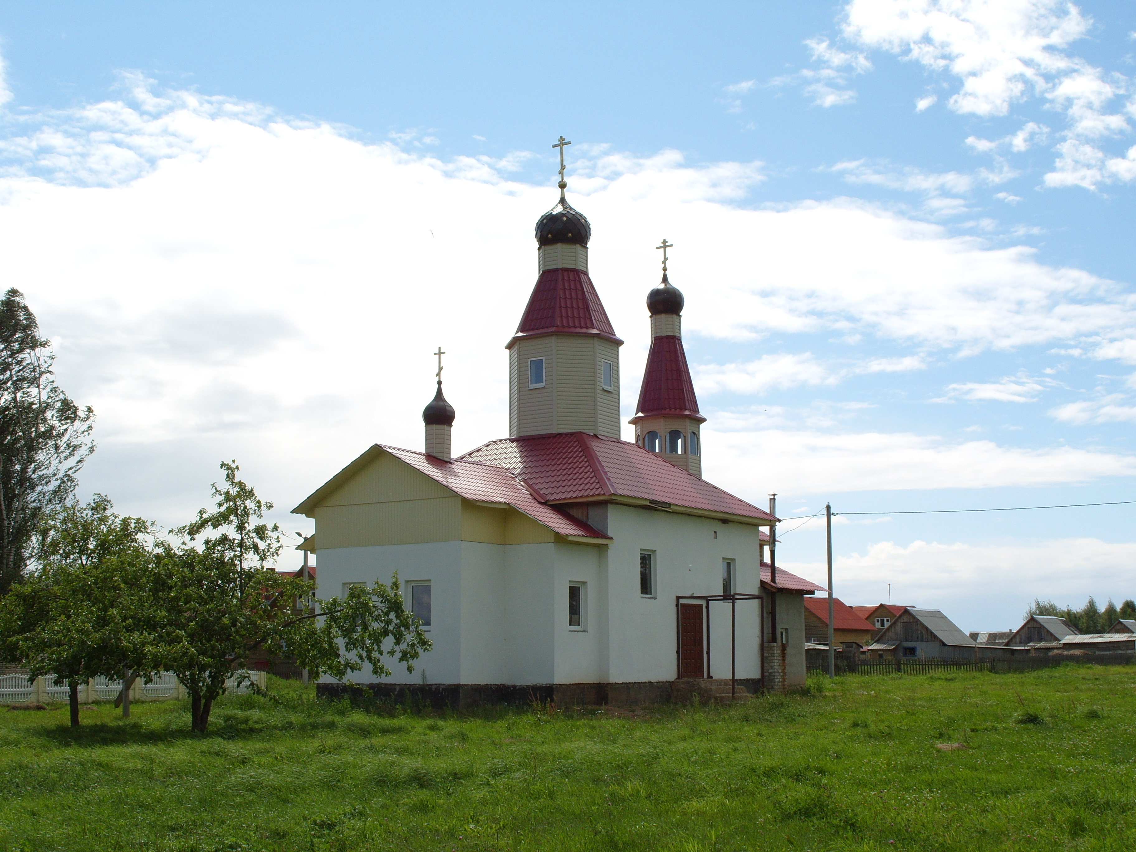 Беларуская (тарашкевіца): Сяліба, царква сьв. Георгія